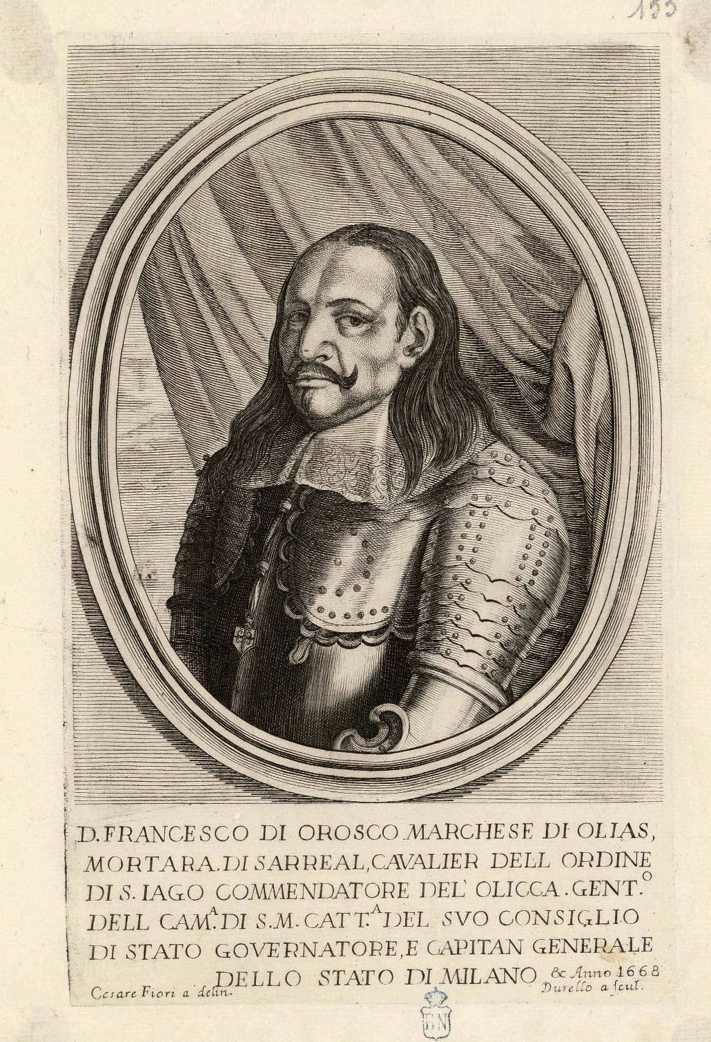 Retrato de Francisco de Orozco, marqués de Olías, gobernador y capitán general del estado de Milán, 1668. Ilustración de la Historia di Leopoldo Cesare de Galeazzo Gualdo, Viena, 1670-1674.